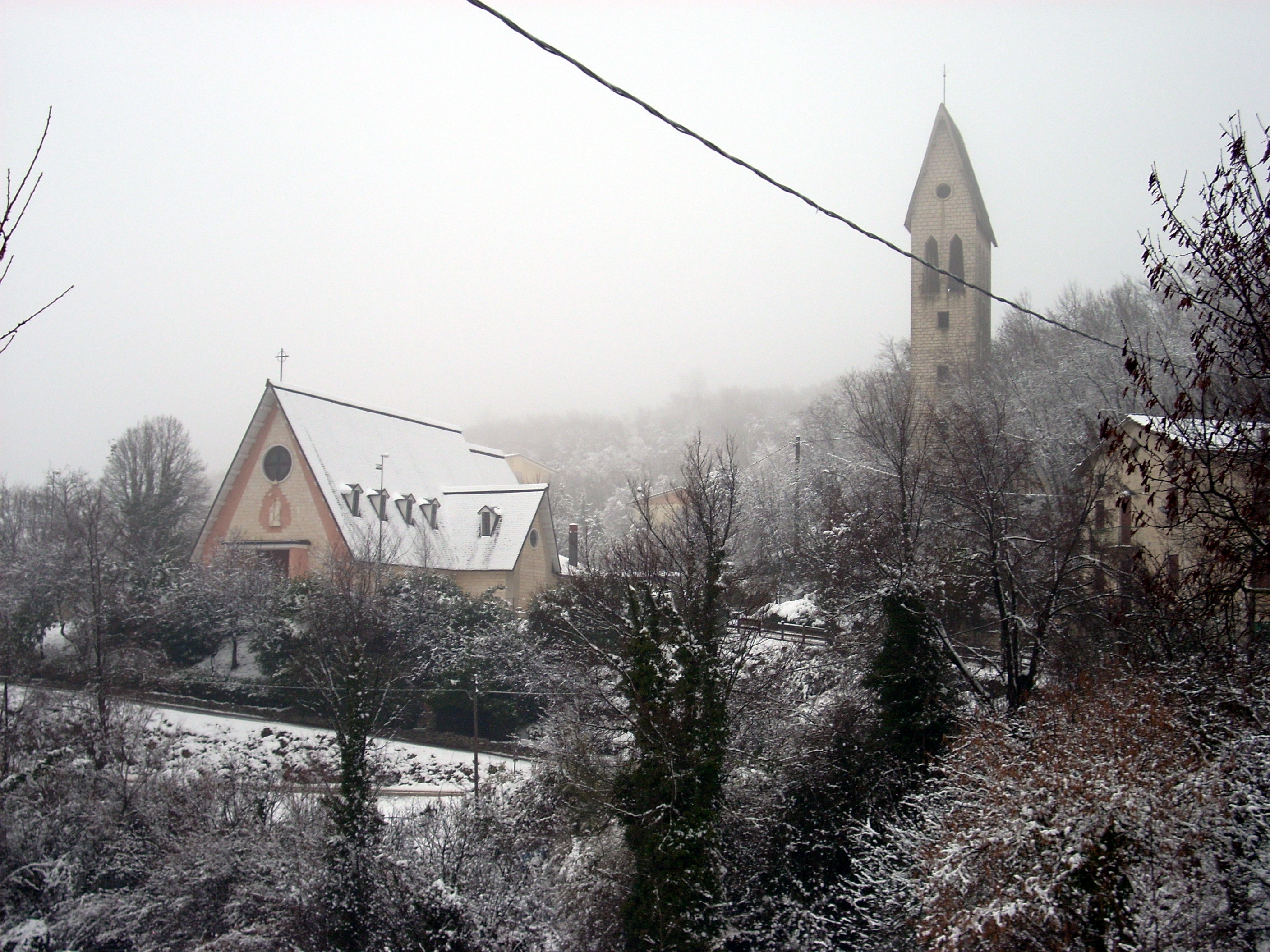 La chiesa ed il campanile di San Giovanni in Monte. Marzo 2011